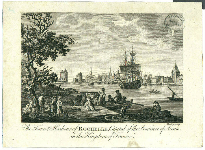 Le port de La Rochelle à la fin du XVIIIe siècle.